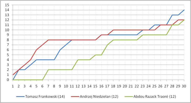 Wykres przedstawiający przebieg rywalizacji o tytuł Króla Strzelców w poszczególnych kolejkach sezonu piłkarskiej Ekstraklasy w sezonie 2010/2011